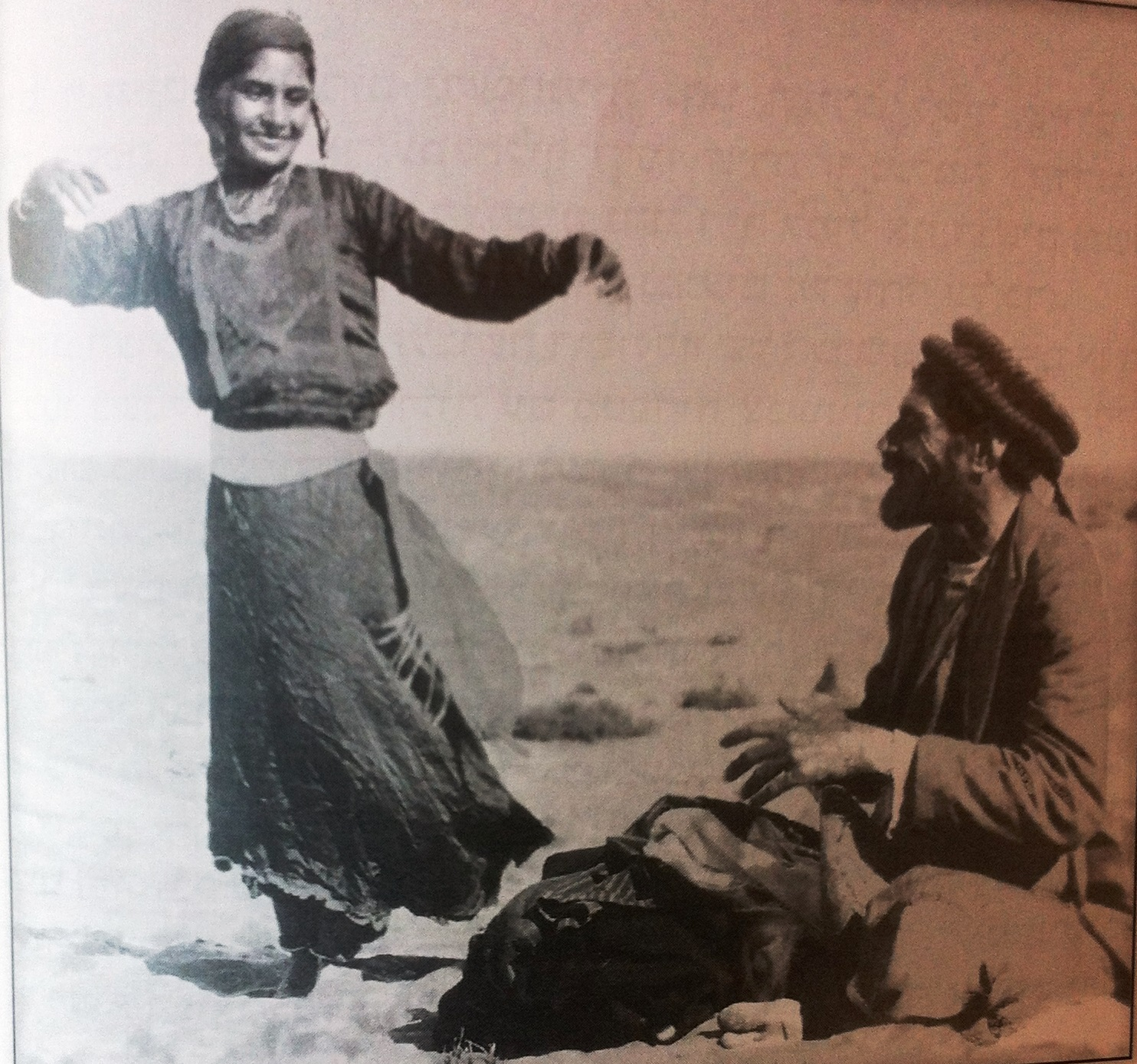 רקדנית בעת הופעה לצלילי התוף